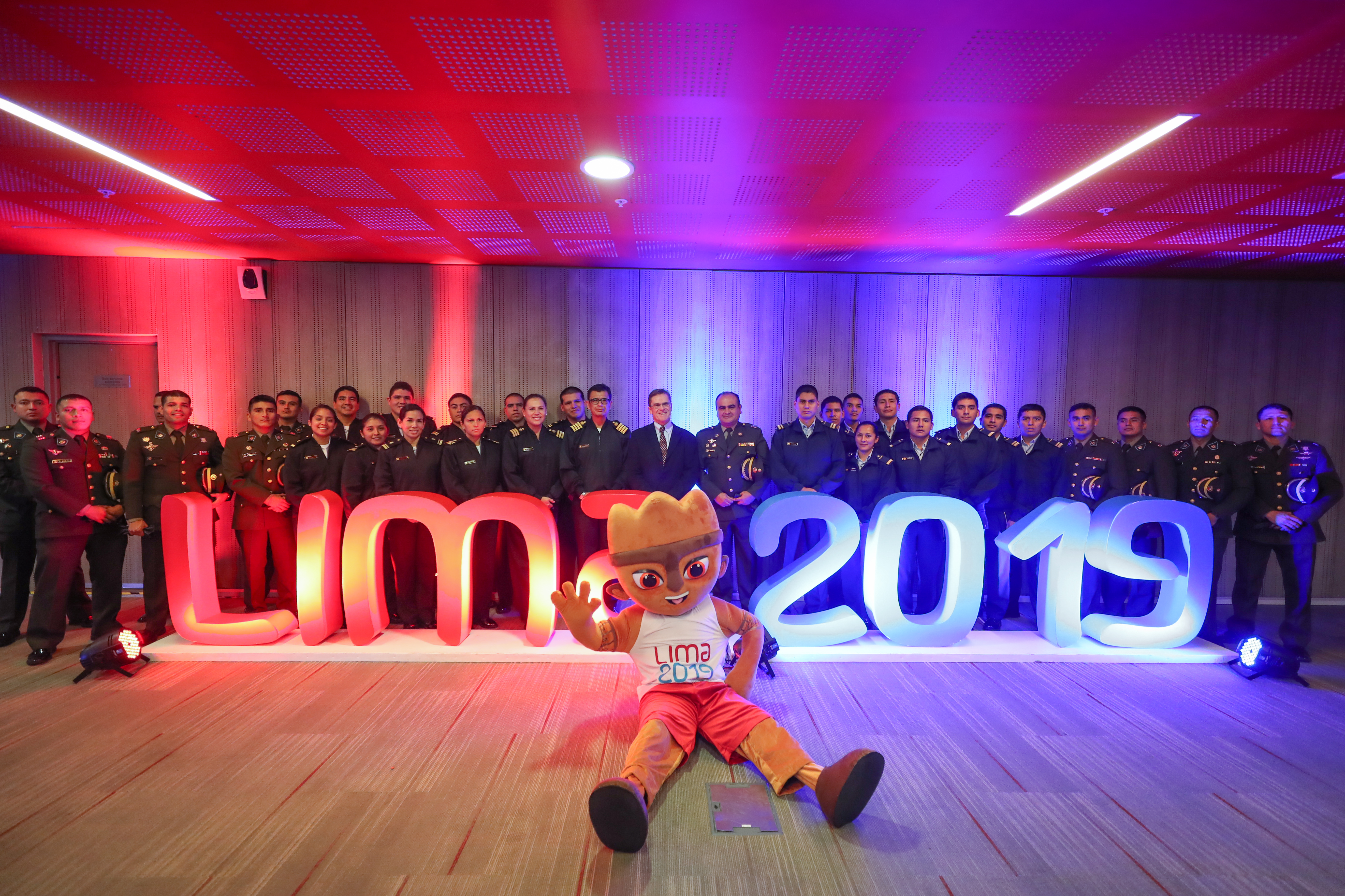 Foto oficial del Ministerio de Defensa para los juegos panamericanos y parapanamericanos 2019.